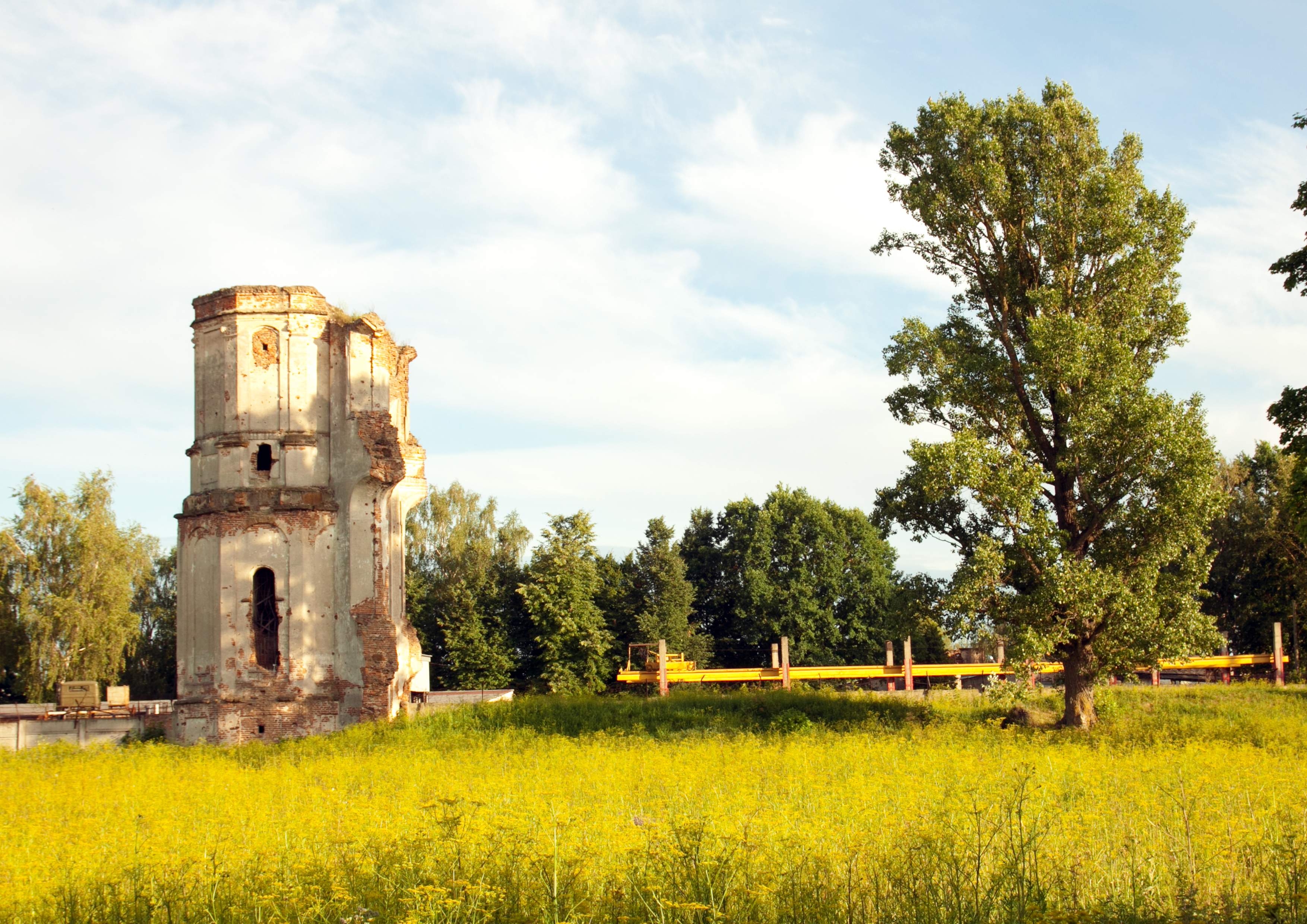 Беларуская (тарашкевіца): Рэшткі былога кляштару картэзіянцаў:брамаагароджа зь вежамібудынак шпіталя. г. Бяроза This is a photo of Belarusian heritage monument. Reference number: 112Г000133 ( WLM)